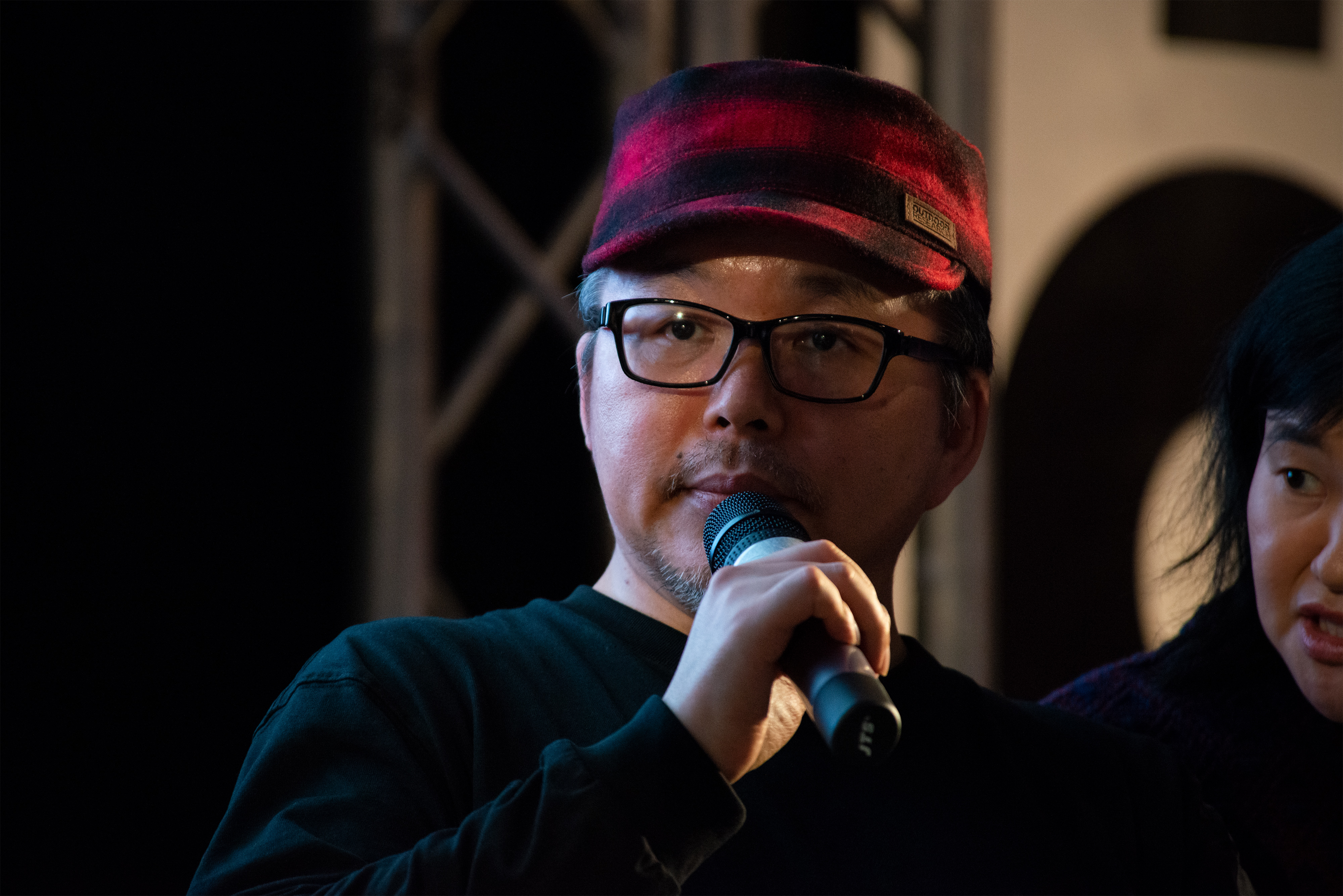 Rencontre Enki Bilal & Yukito Kishiro, Espace Manga, Festival International de la Bande Dessinée d'Angoulême 2020.